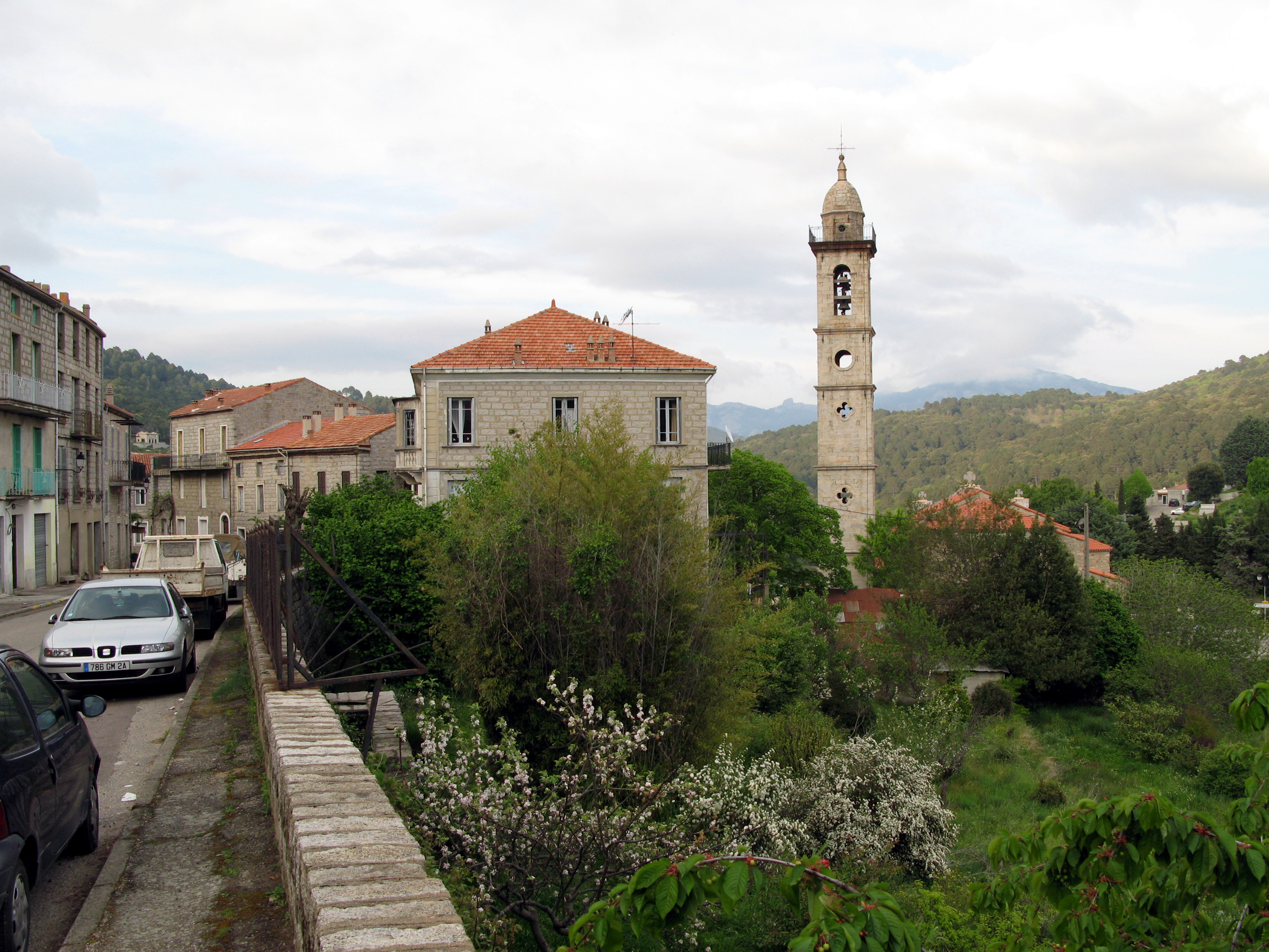 Levie (Corse-du-Sud, France) - Centre du village avec le clocher de l’église paroissiale Saint-Nicolas